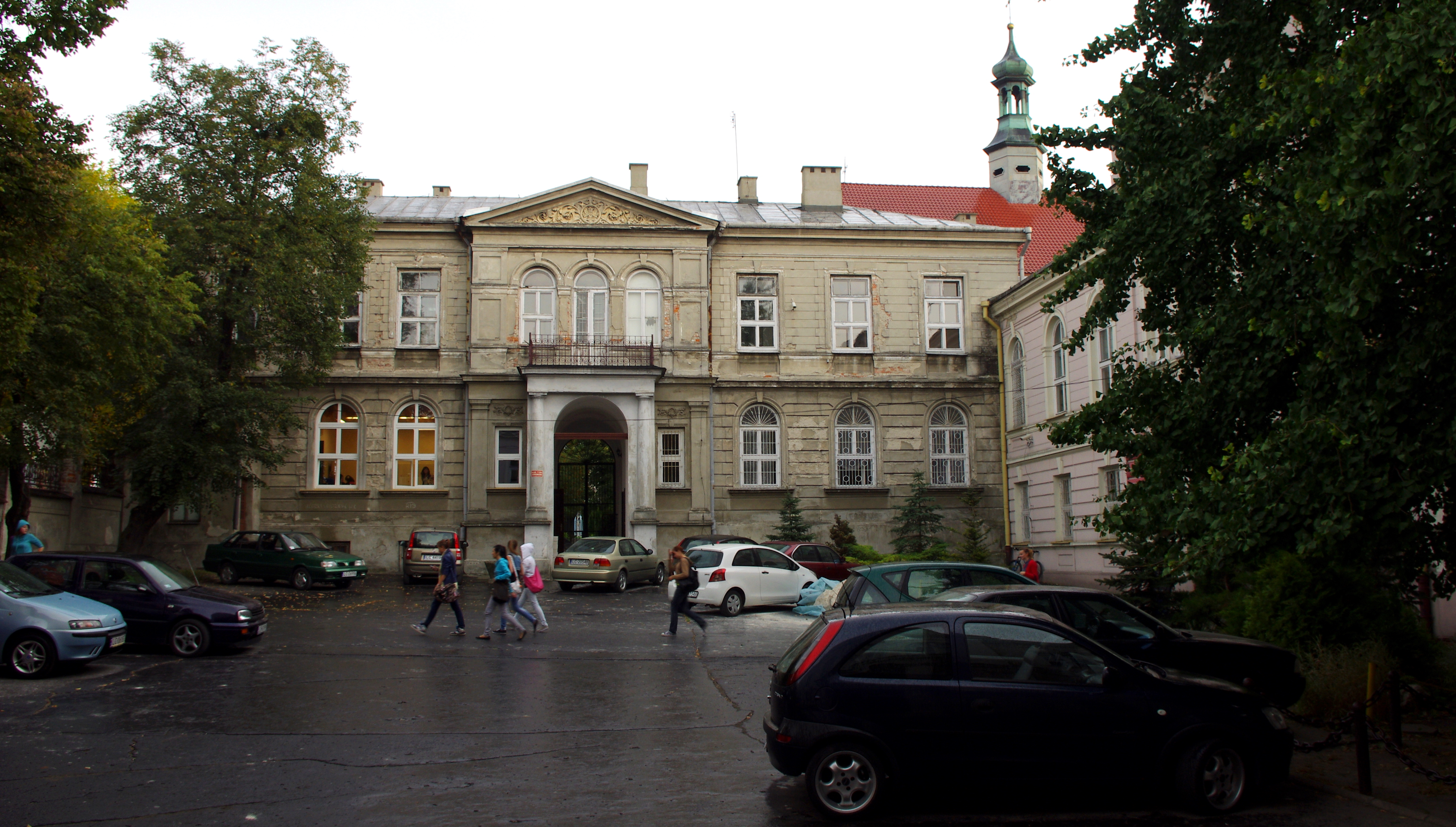 Zespół klasztorny reformatów. Obecnie szkoła zawodowa. (zabytek nr rejestr. A/66)